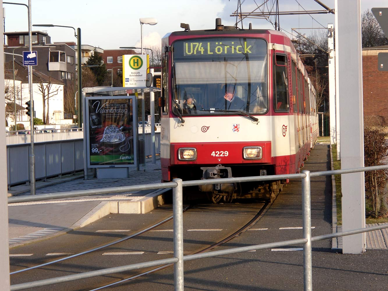 Tram in Benrath